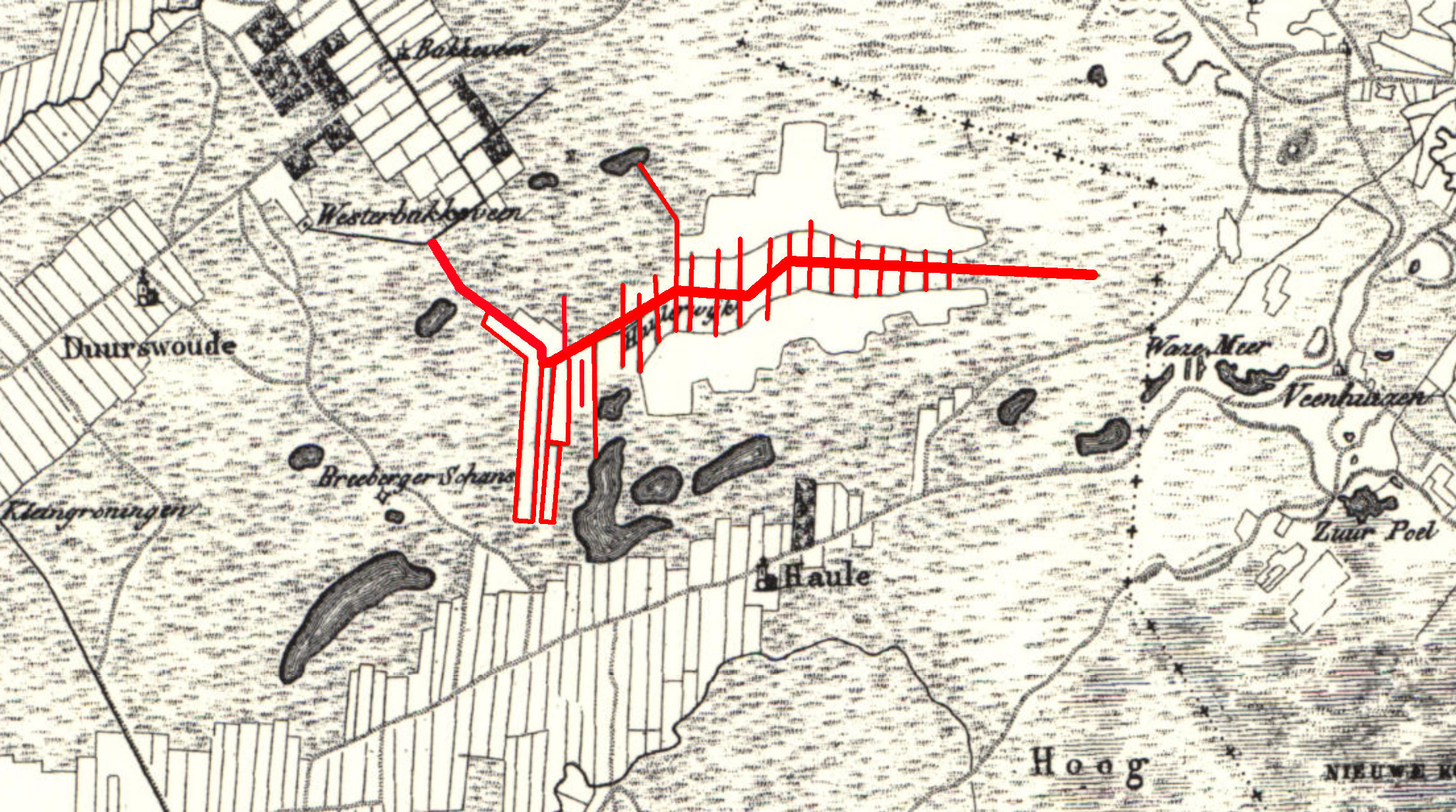 De Haulerwijkstervaart op een topografische kaart omstreeks 1822, de zwarte lijnen van de vaart en de wijken zijn door mij (uploader) rood gekleurd